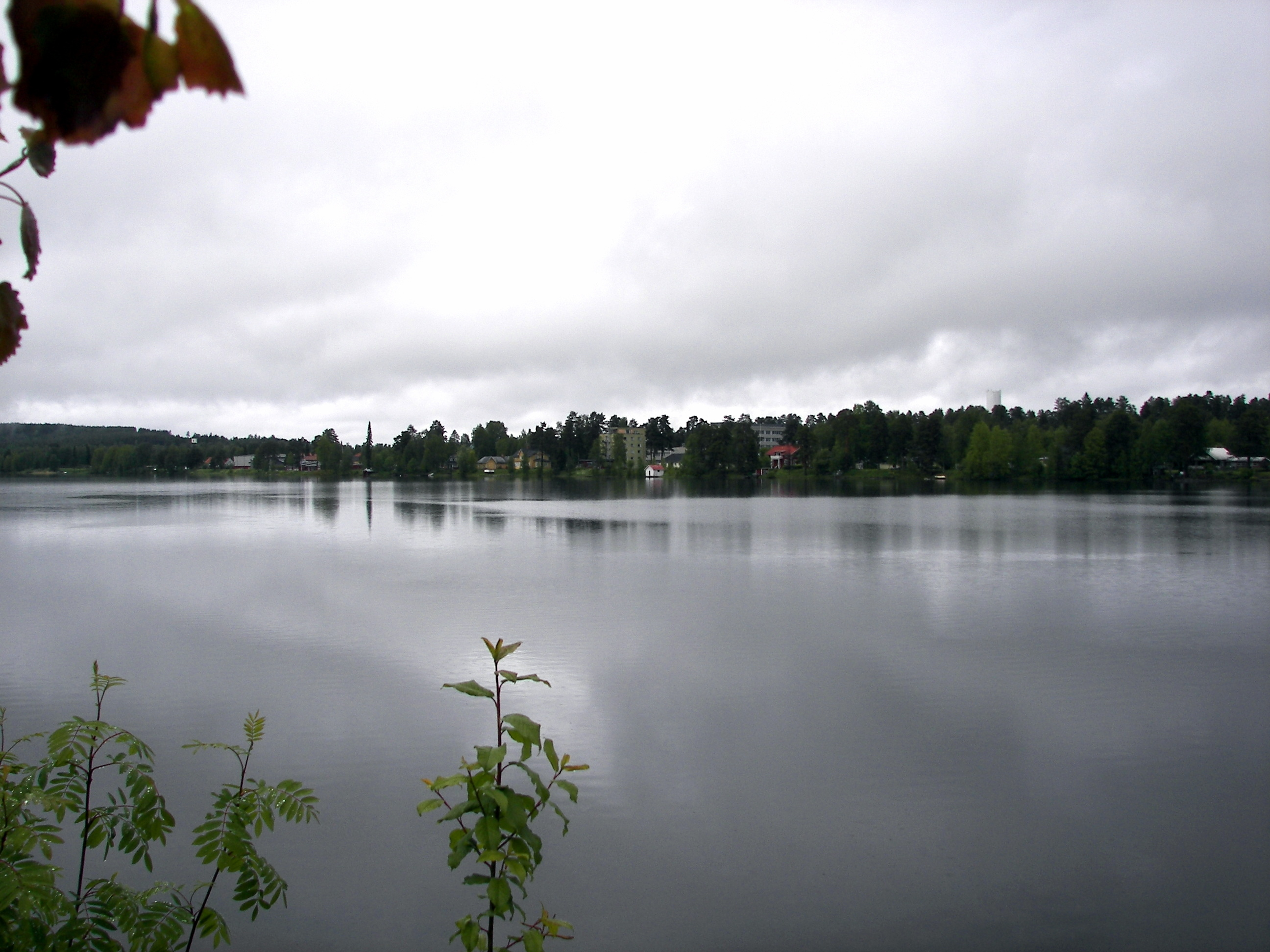 Fjällsjön.